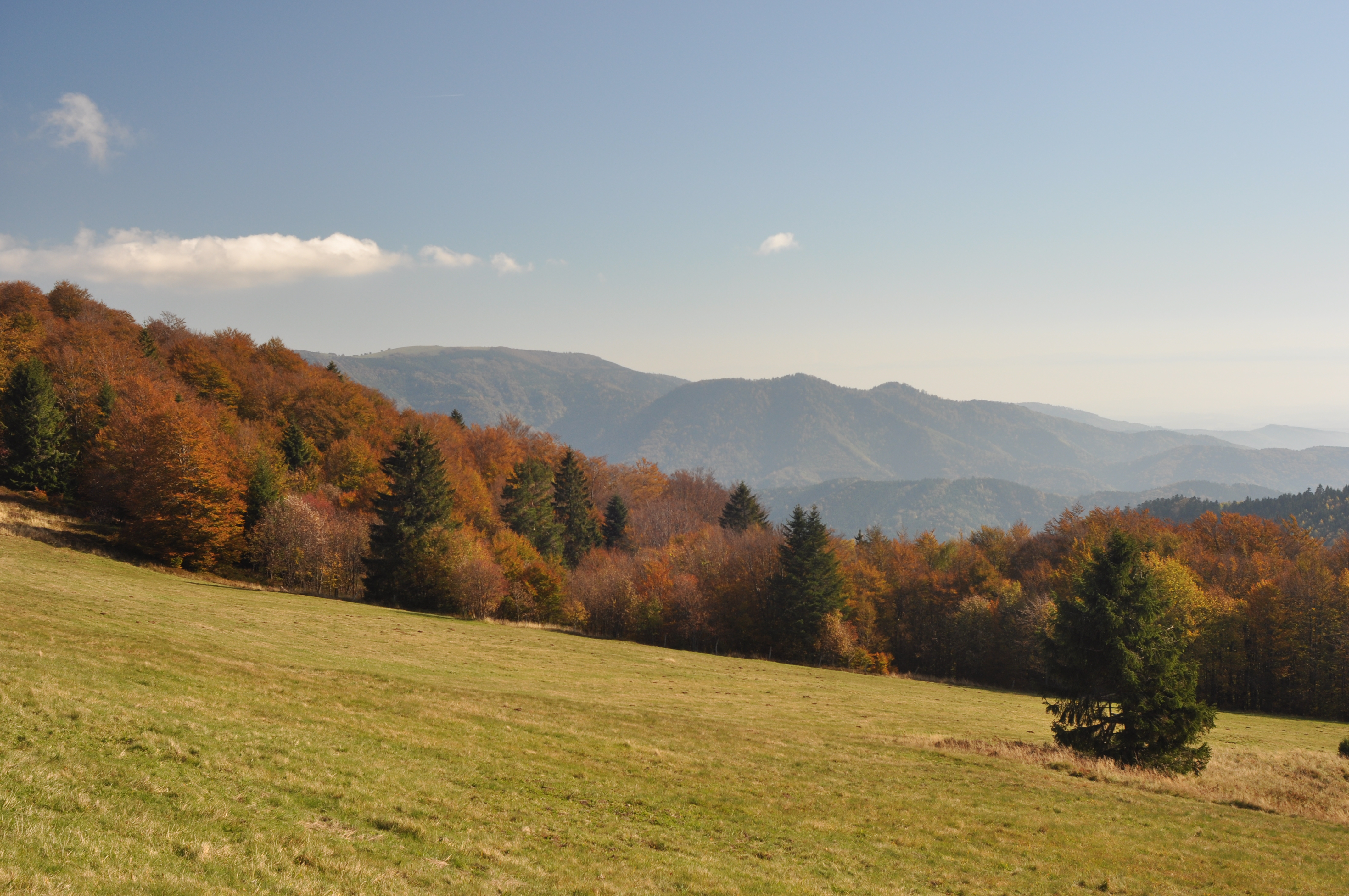 paysage des Vosges méridionales